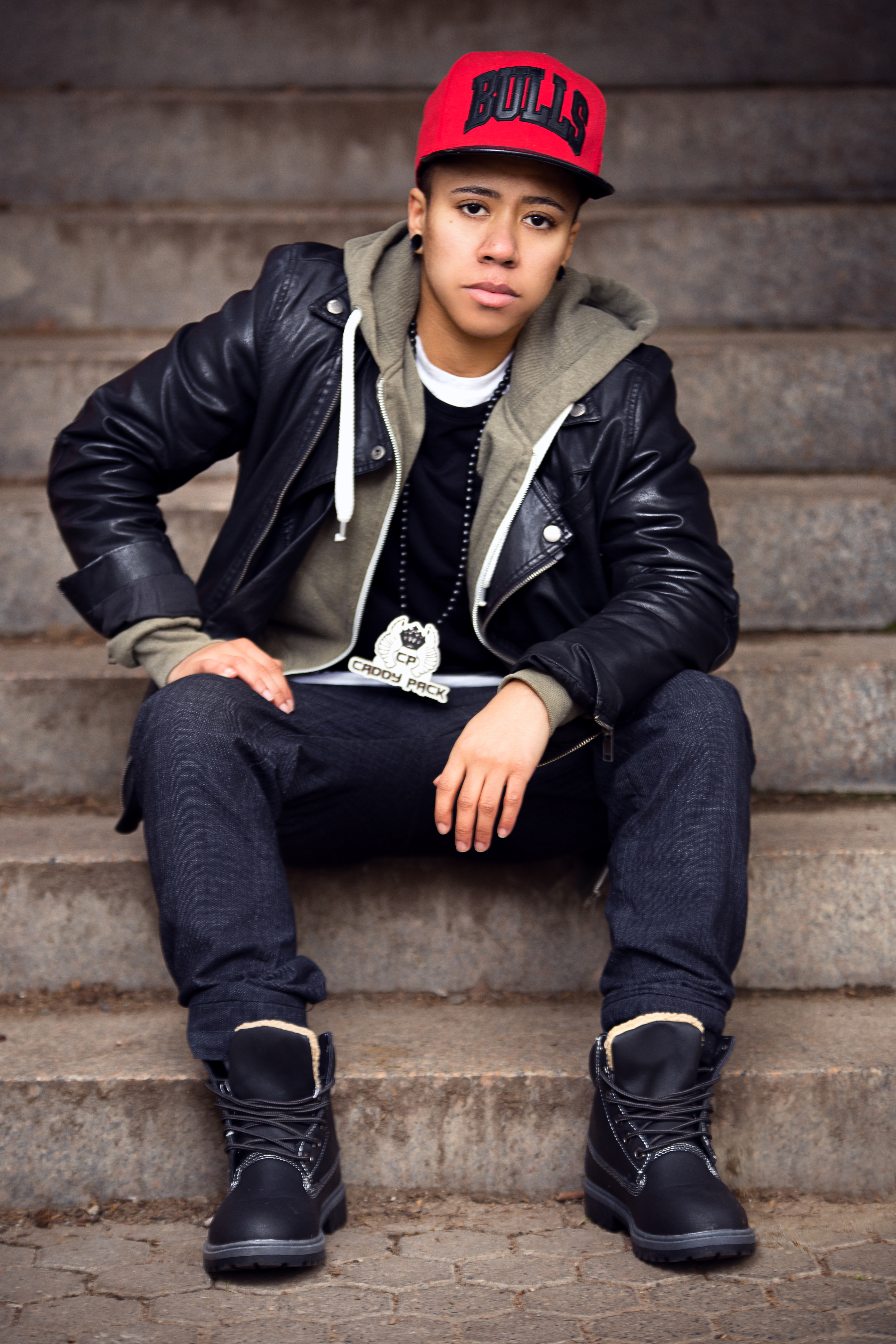 Caddy Pack in Mannheim (2015)